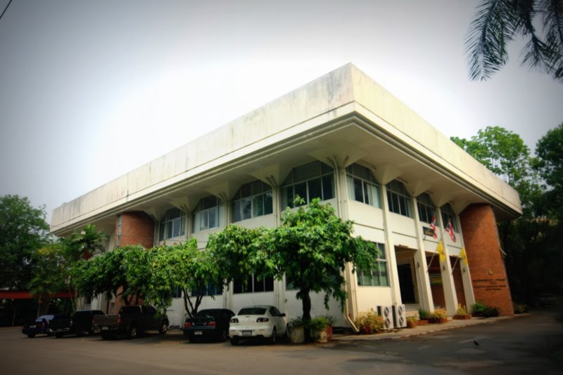 อาคารรัตนโกสินทร์ 200 ปี คณะผลิตกรรมการเกษตร